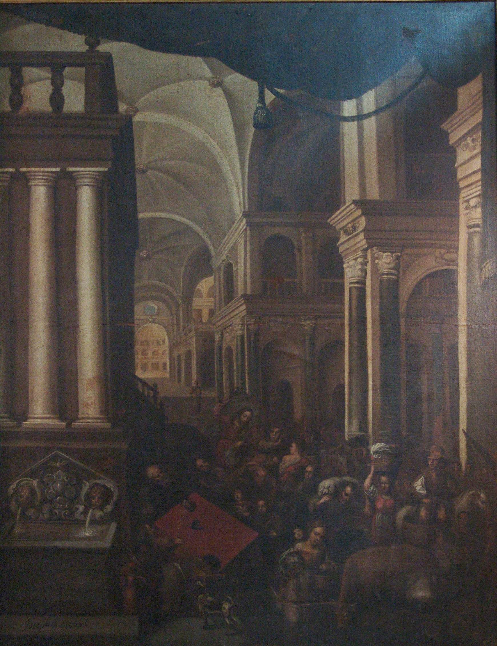 La obra representa a Jesucristo expulsando a los mercaderes del Templo de Jerusalén.